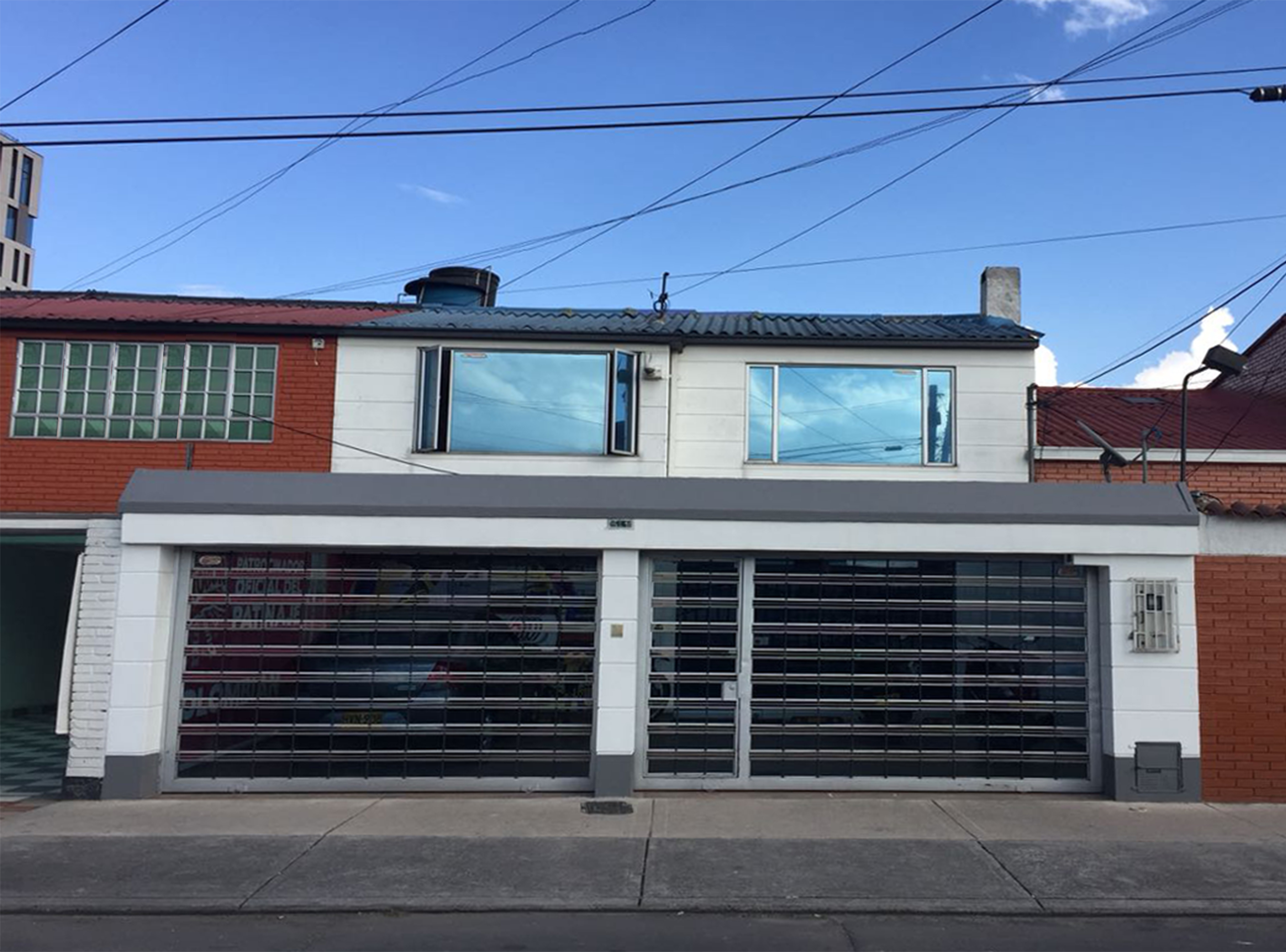 Sede de la Federación Colombiana de Patinaje en Bogotá